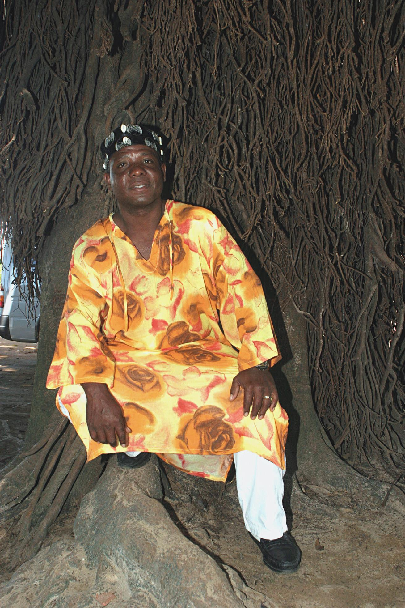 Sacerdote Miguel do Terreiro Ilê Axé Opô Afonjá em Salvador, Bahia